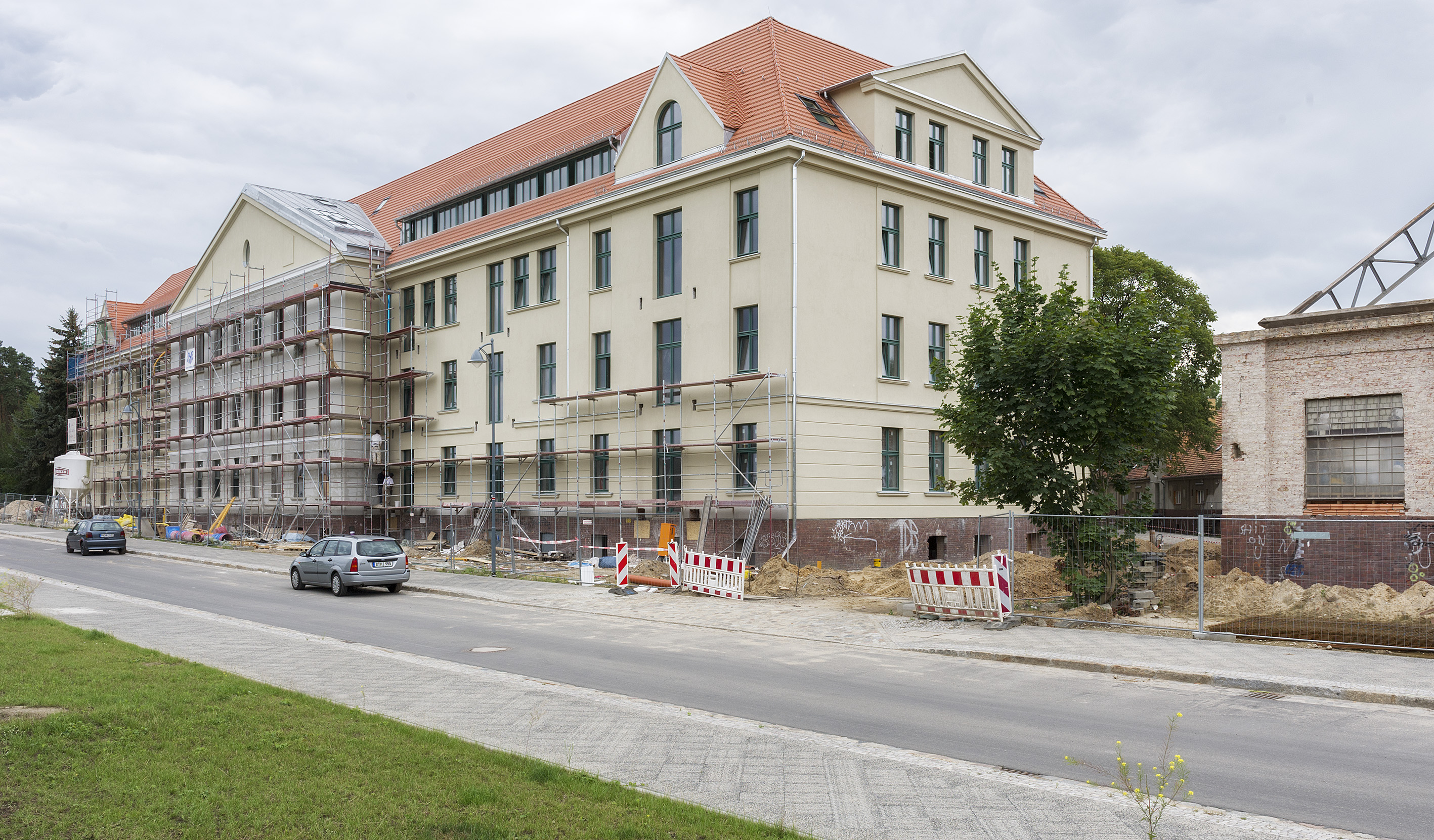 Königs Wusterhausen, Funkerberg. Ehem. Mannschaftsgebäude während der Sanierung, 2015.